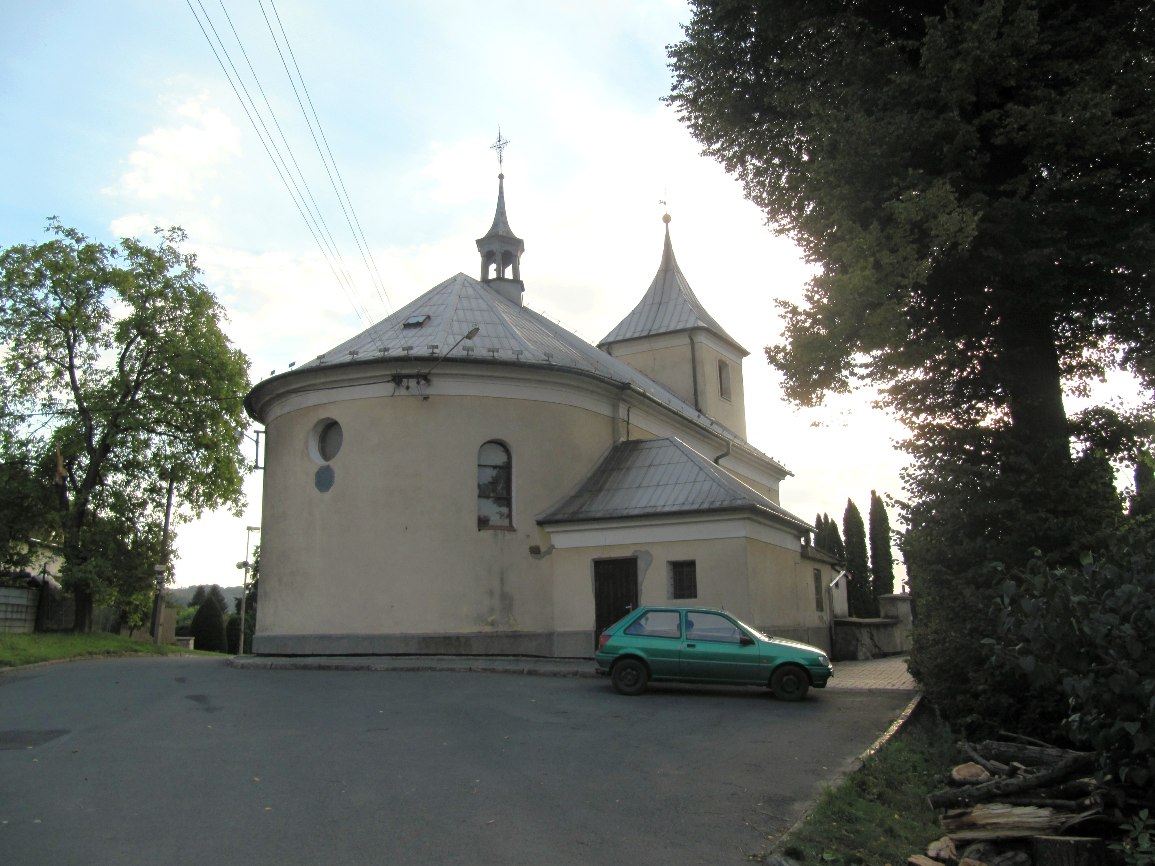 Týn nad Bečvou